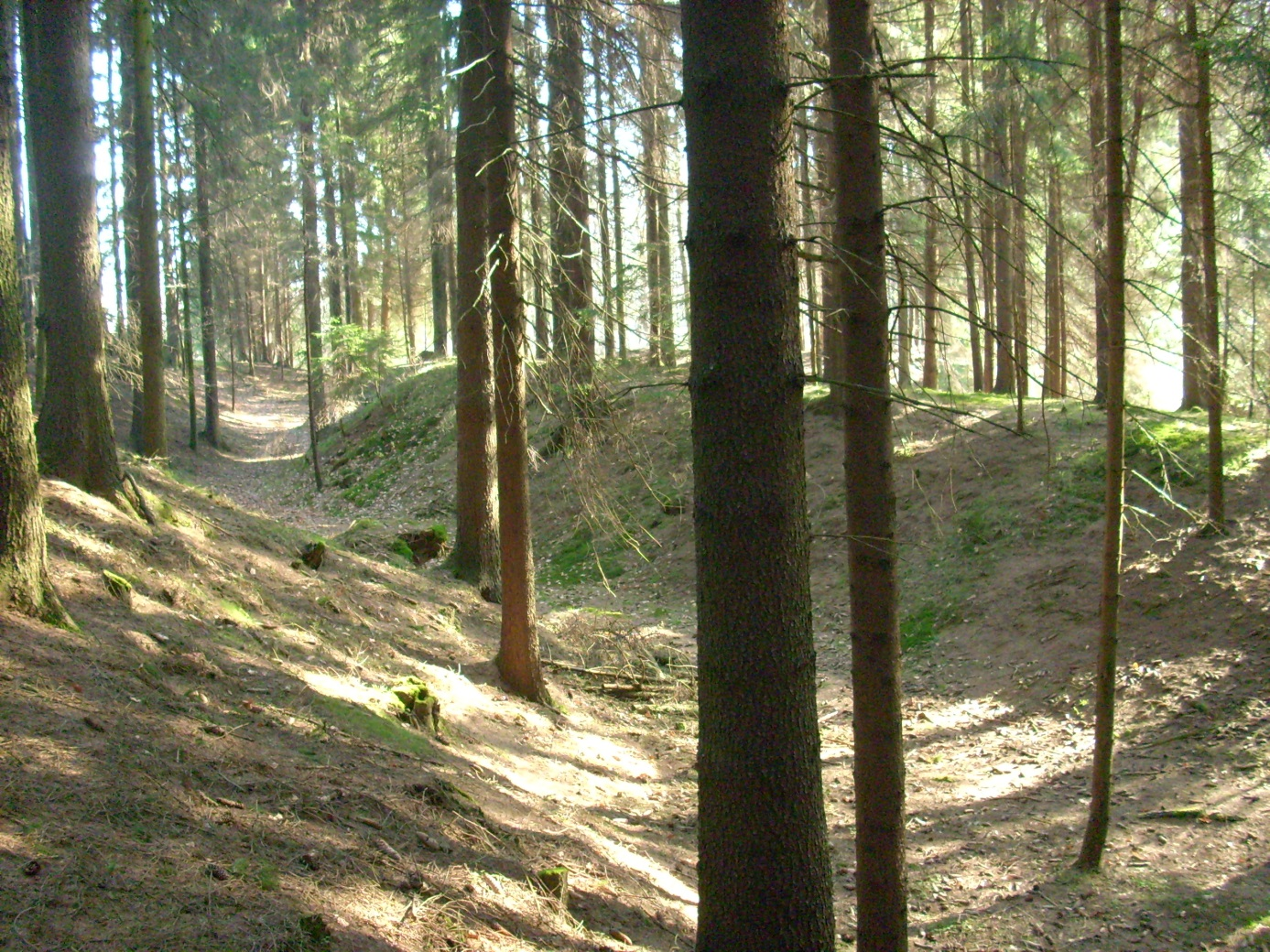 Burggraben des Burgstalls Buckeck (Stadt Gefrees, Fichtelgebirge)